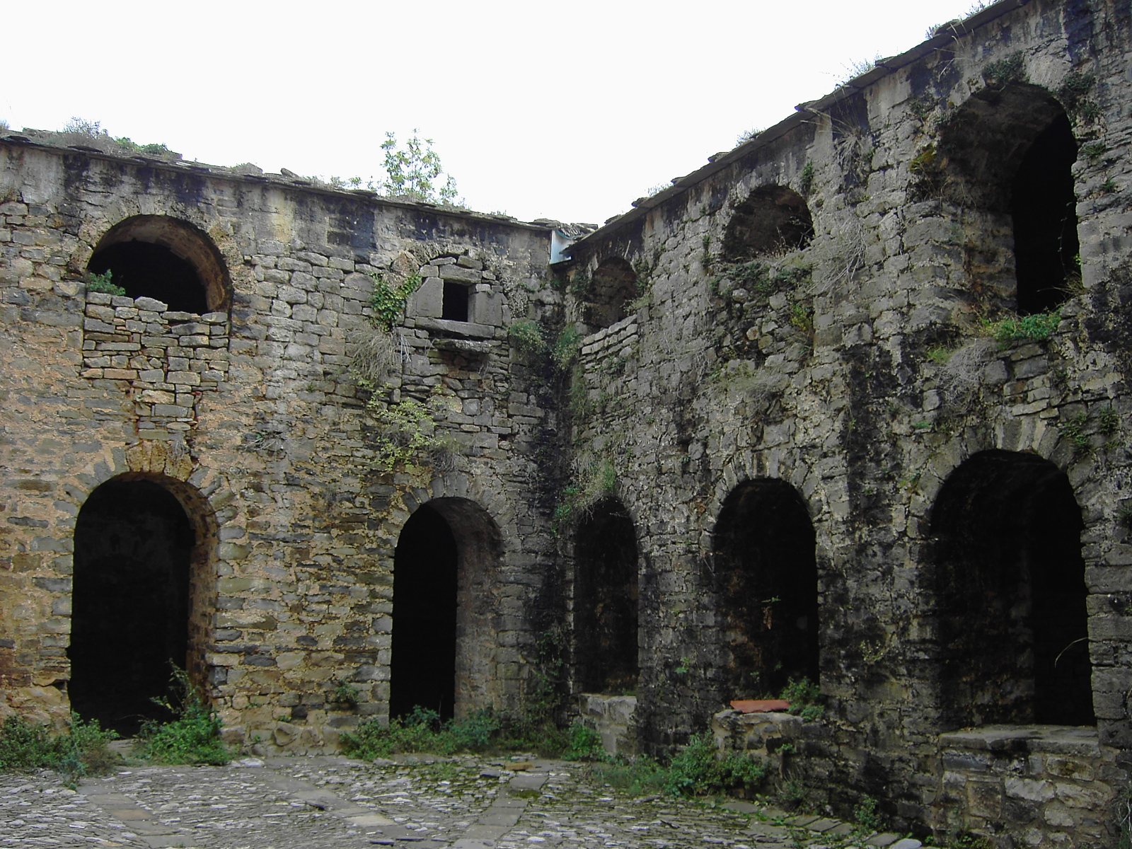 El interior del claustro de San Victorián. Fachadas oriental y meridional.